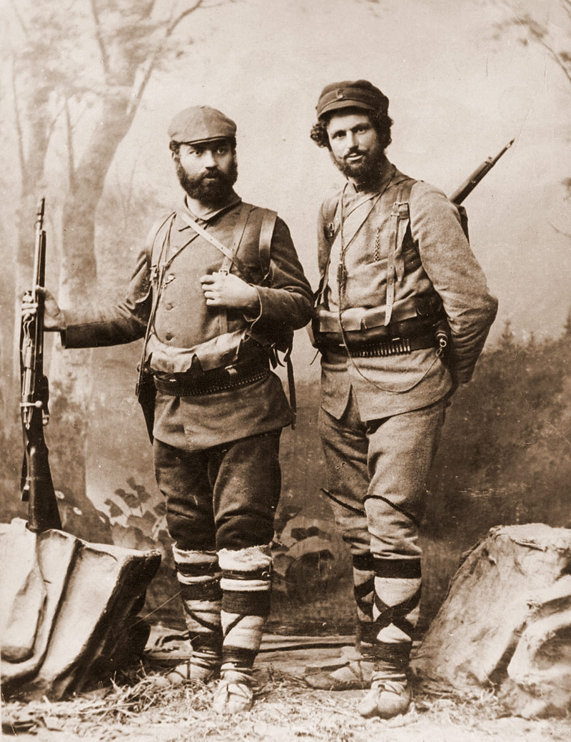 Мингьо Тодев и Кочо Молеров в 1903 година.